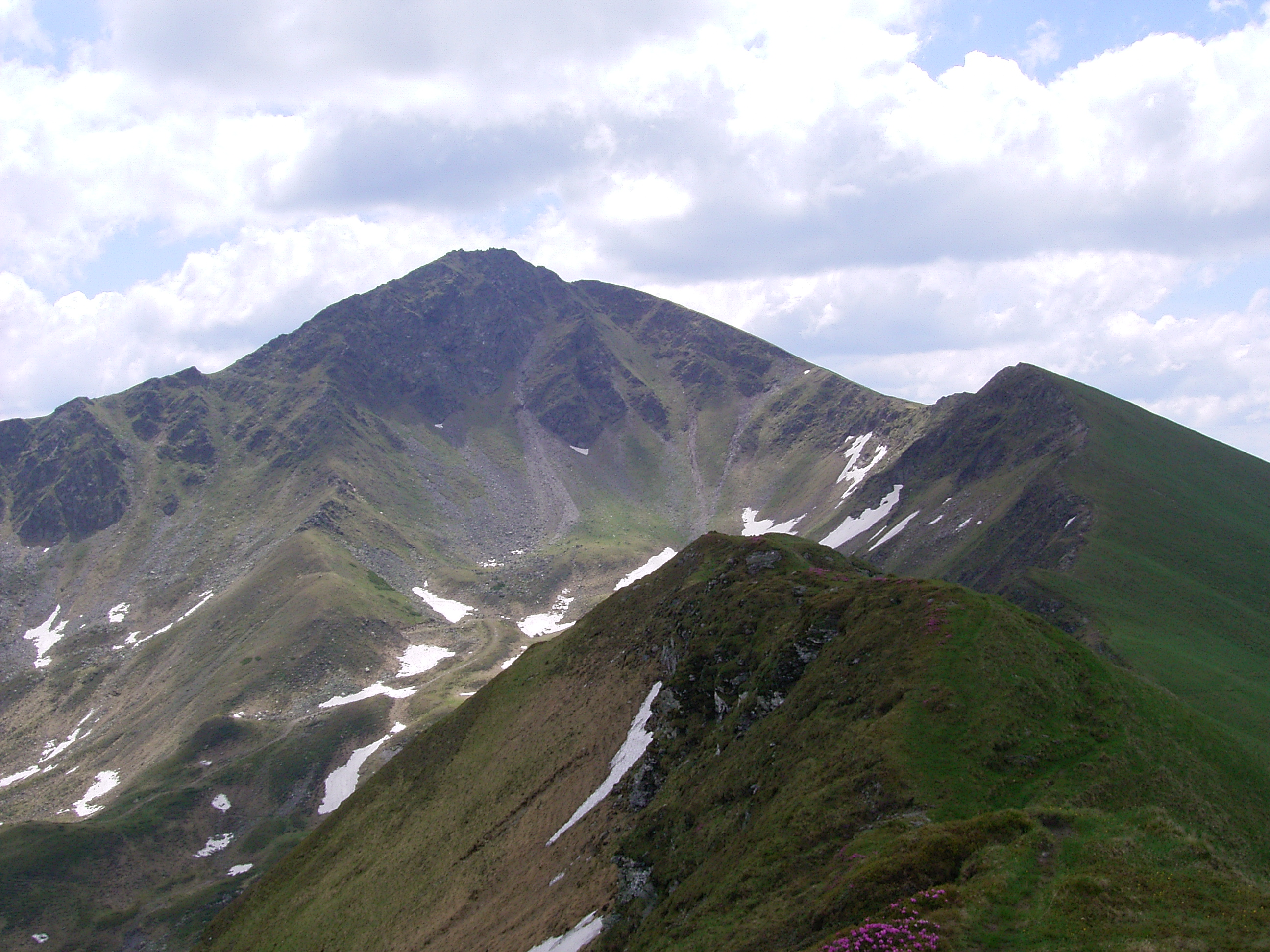 Vârful Ineu